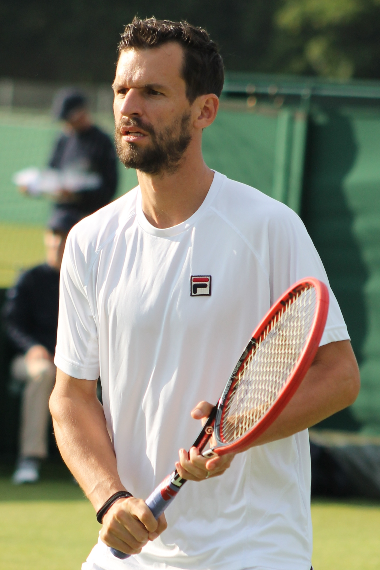 Petzschner WMQ15 (8)